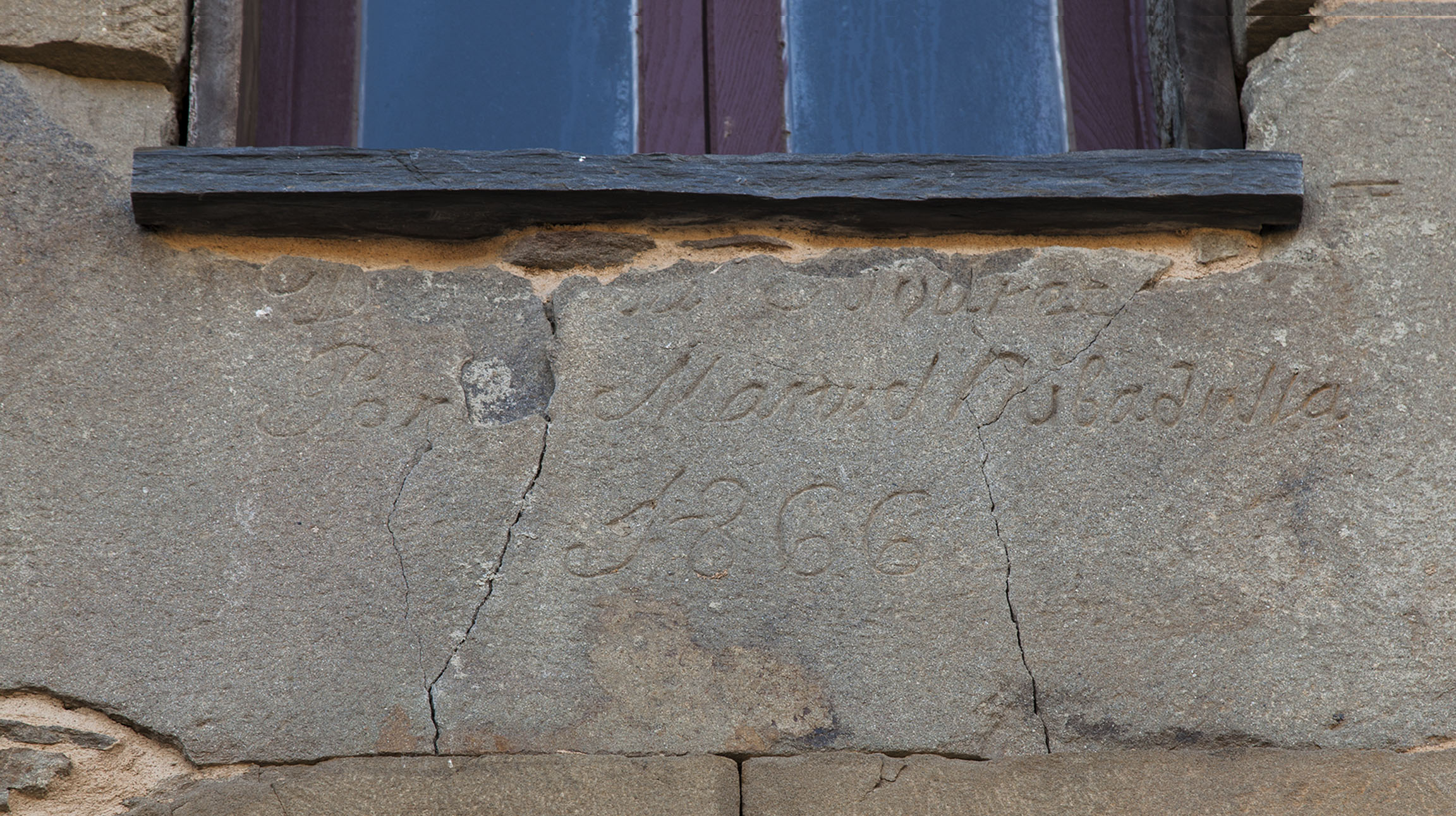 Detalle de roca grabada localizada durante los trabajos de restauración de la casa de los pendonistas de Albares de la Ribera